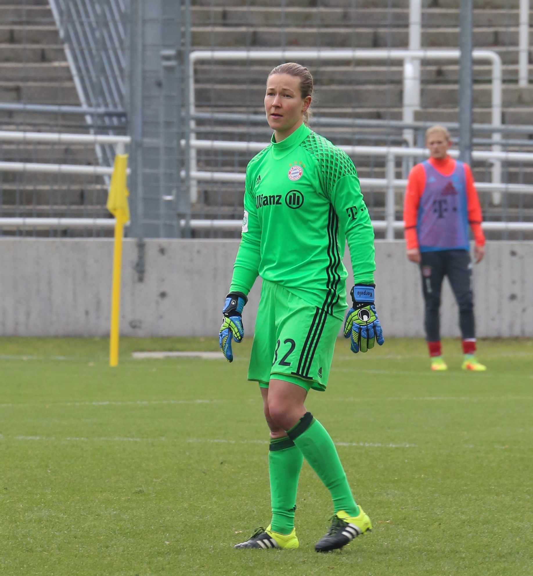 Tinja-Riikka Korpela (FC Bayern München) beim Frauen-Bundesliga-Spiel FC Bayern München gegen 1. FFC Frankfurt am 13. November 2016 im Stadion an der Grünwalder Straße, München (Ergebnis war 1:0).